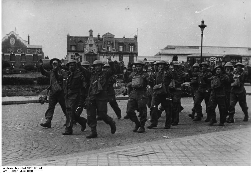 Calais, kriegsgefangene britische Soldaten Die Einnahme von Calais. - Diese Aufnahme wurde während der Durchsuchung feindlicher Widerstandsnester in Calais gemacht. - Hier kommt ein Trupp Engländer mit erhobenen Armen unseren Truppen entgegen. PK-Horter Juni 1940